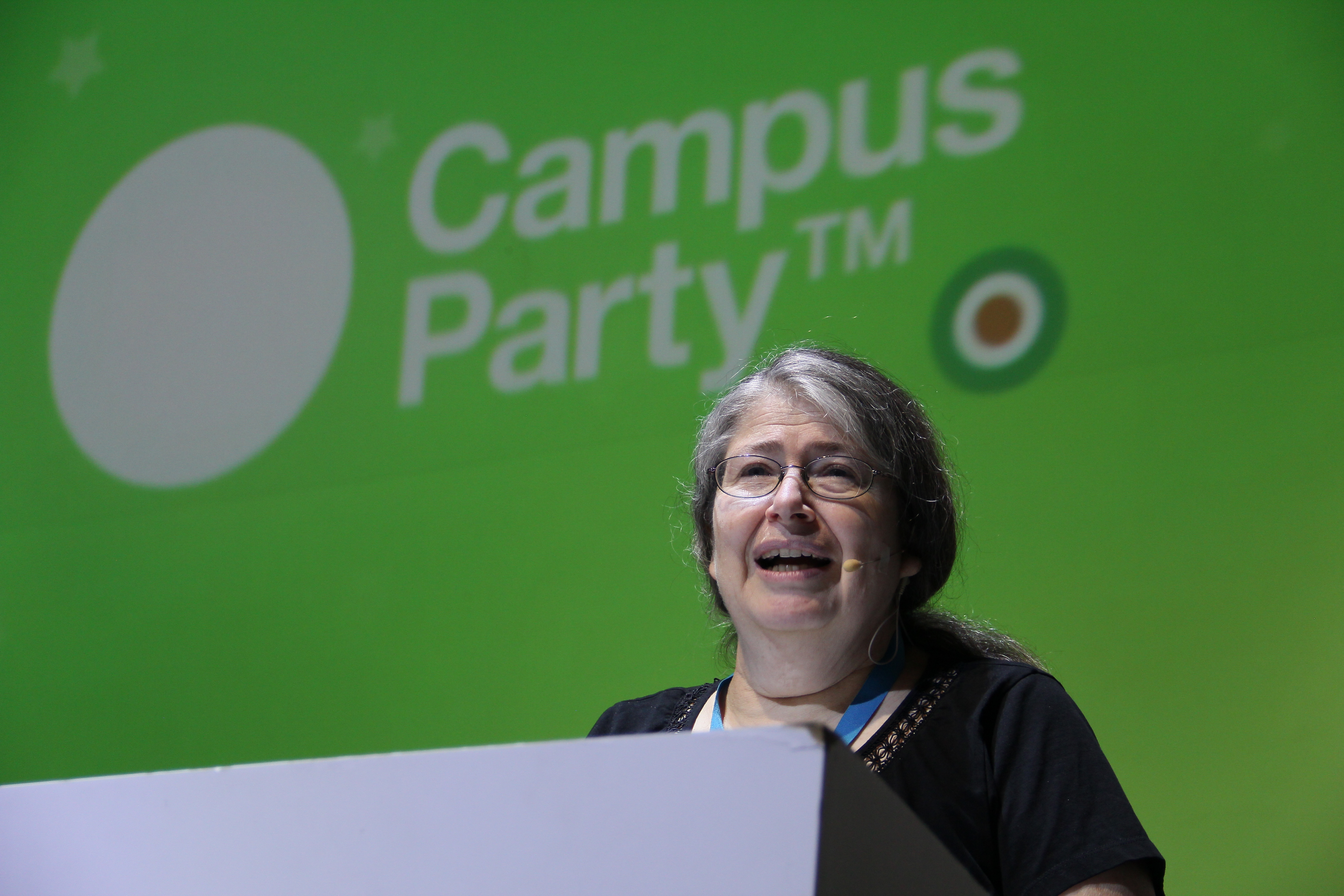 Radia Perlman